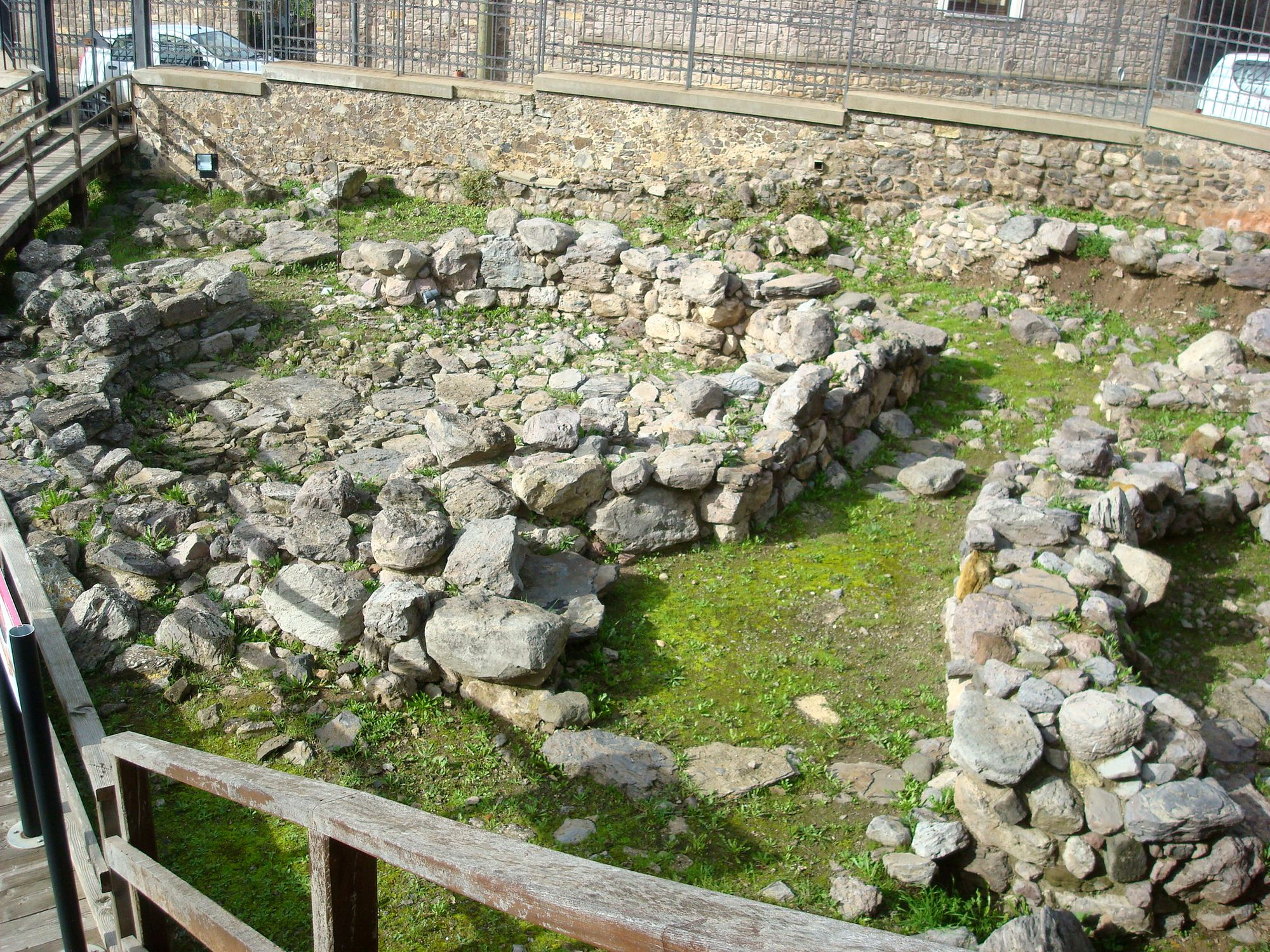 Capanna nuragica I di Sant'Anastasia